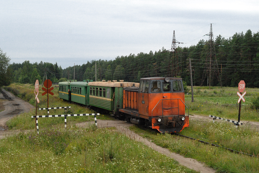 ТУ7А-3042 in Karintorf